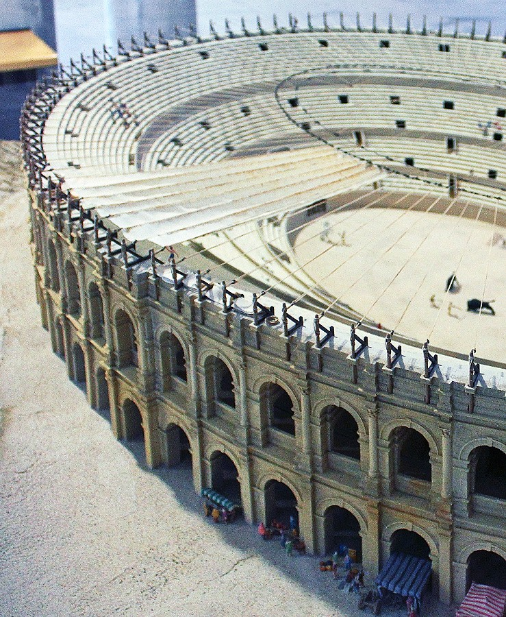 Model des Amphitheaters von Arles (Arelate) im Archäologischen Museum von Arles (Musée départemental Arles antique) mit aufgespanntem Velarium und Verkaufsständen in den Arkaden.